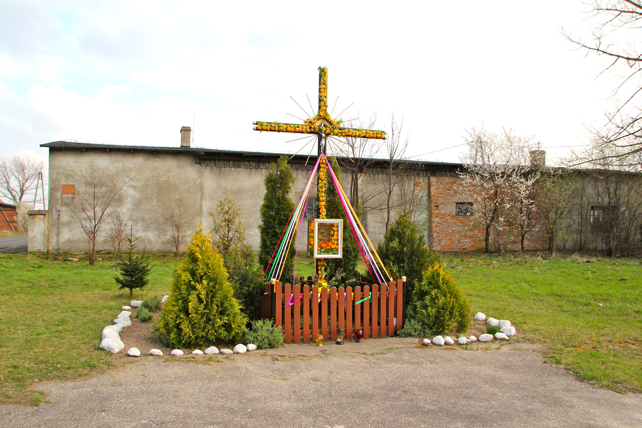 Strogoborzyce – województwie dolnośląskim, w powiecie polkowickim, w gminie Radwanice.